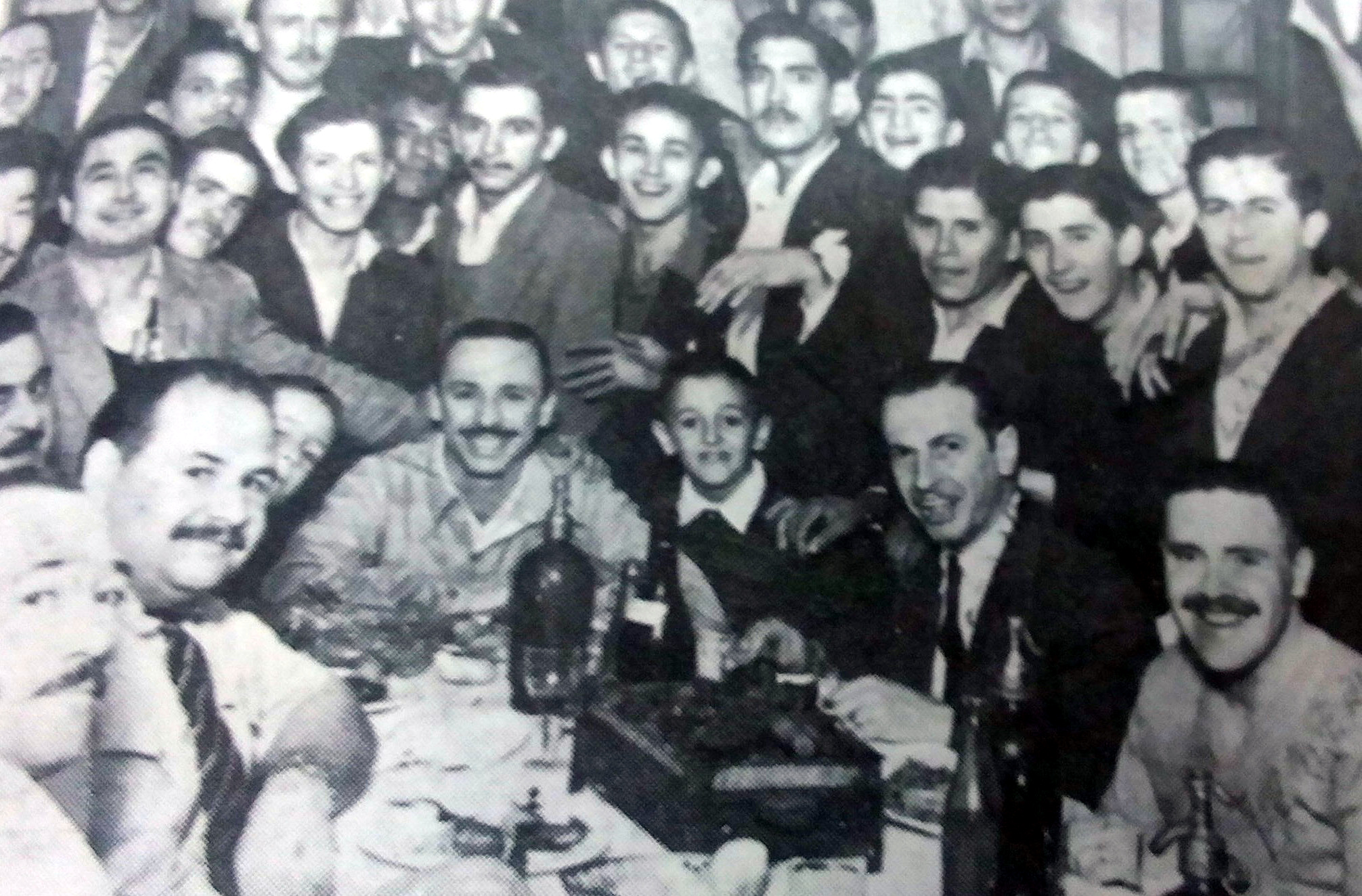 Oscar Alfredo Gálvez rodeado de amigos y admiradores en su visita a la ciudad de Oberá a fines de la década de 1930